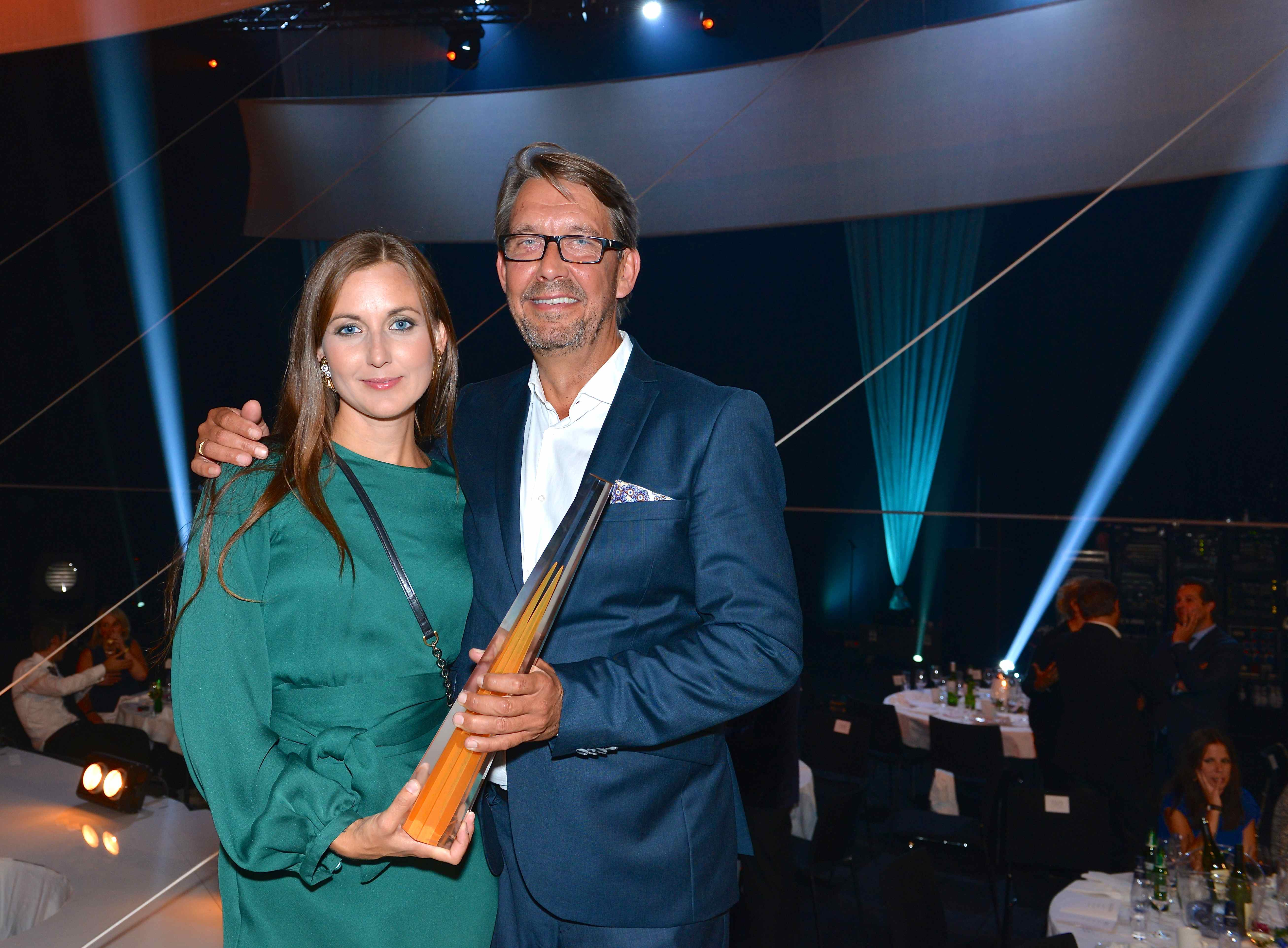 TV3:s Stalkers blev vinnare av Kristallen för Årets fakta- och aktualitetsprogram, på Kristallengalan den 30 augusti 2013. Programledarna Sanna Lundell och Hasse Aro.